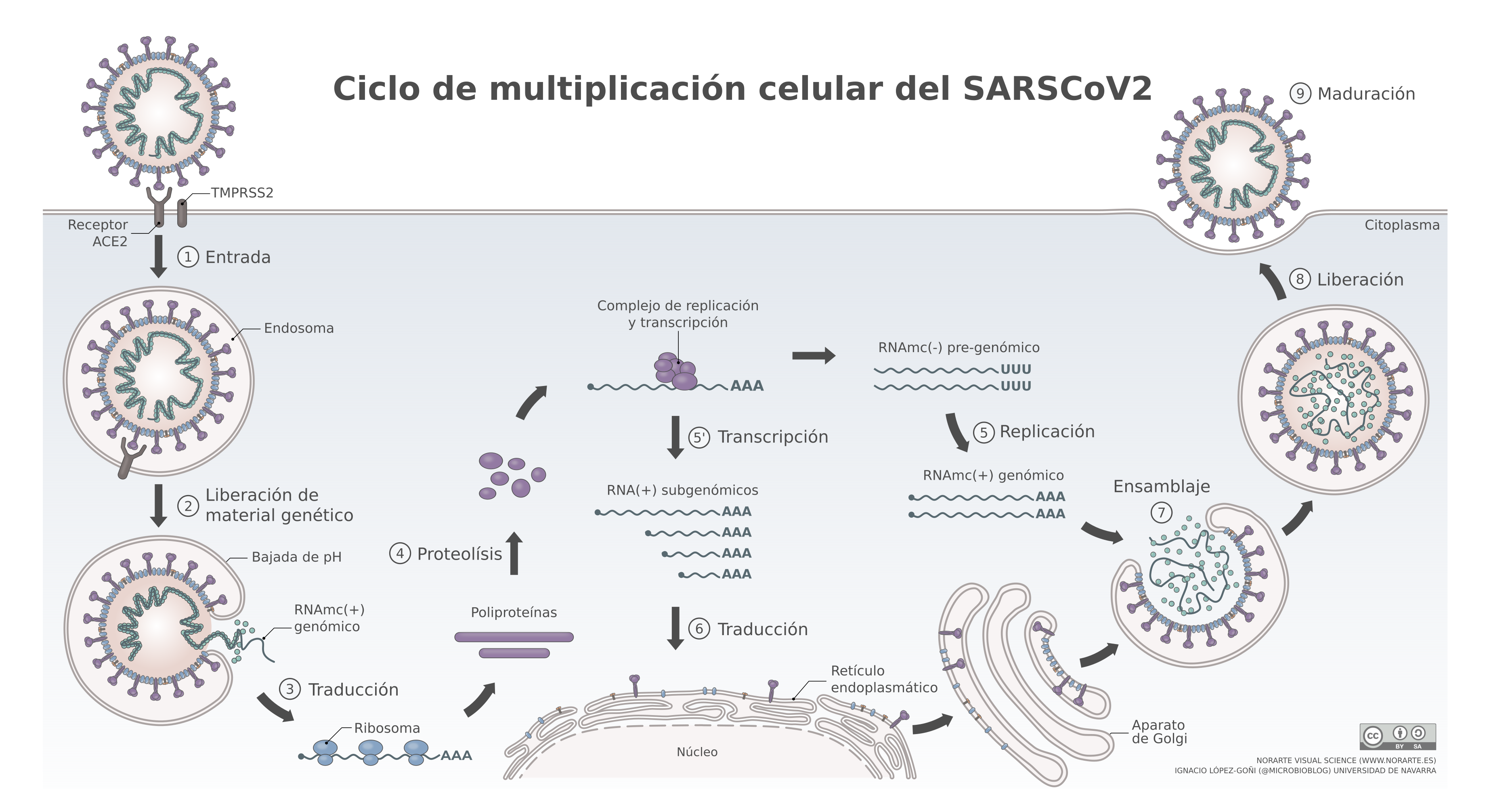 La glicoproteína S de la envoltura del virus interacciona con el receptor celular ACE2: enzima 2 que convierte la angiotensina, una proteína de la membrana celular que cataliza la conversión de angiotensia I en el nonapéptido angiotensina 1-9 o de angiotensia II en angiotensina 1-7. El virus entra por endocitosis. Una vez en el endosoma ocurre una baja de pH mediada por lisosomas, que promueve la fusión de la membrana del endosoma con la envoltura del virus, lo que libera la nucleocápside al citoplasma. Proteasas celulares degradan la cápside y el genoma del virus queda libre en el citoplasma. A continuación, al ser un genoma ARN sentido positivo, la maquinaria celular traduce directamente a poliproteínas que son procesadas y se forma el complejo de replicación y transcripción. Luego se sintetiza la hebra complementaria de ARN pre-genómico sentido negativo que servirá como molde para replicar el genoma viral sentido positivo. Además, el complejo de replicación y transcripción sintetizará a una serie de ARN subgenómicos sentido positivo, más pequeños. Estos son los que se traducirán a las proteínas virales. Todo este proceso ocurrirá en el citoplasma de la célula. Se irán sintetizando las proteínas estructurales que se expresarán en la membrana del retículo endoplasmático. Ahí, en el retículo, es donde ocurrirá el ensamblaje. De hecho la envoltura del virus proviene de la membrana del retículo endoplasmático. La partícula viral viajará, a través del sistema de transporte de vesículas celular en el que interviene el aparato de Golgi, hasta la superficie. La partícula viral saldrá de la célula por exocitosis. Tras una última fase de maduración, en la que intervienen proteasas virales, todos los componentes del virus encajarán, la partícula será infecciosa y podrá comenzar un nuevo ciclo celular. Referencia: SARS and MERS: recent insights into emerging coronaviruses. de Wit E, van Doremalen N, Falzarano D, Munster VJ. Nat Rev Microbiol. 2016 Aug;14(8):523-34.